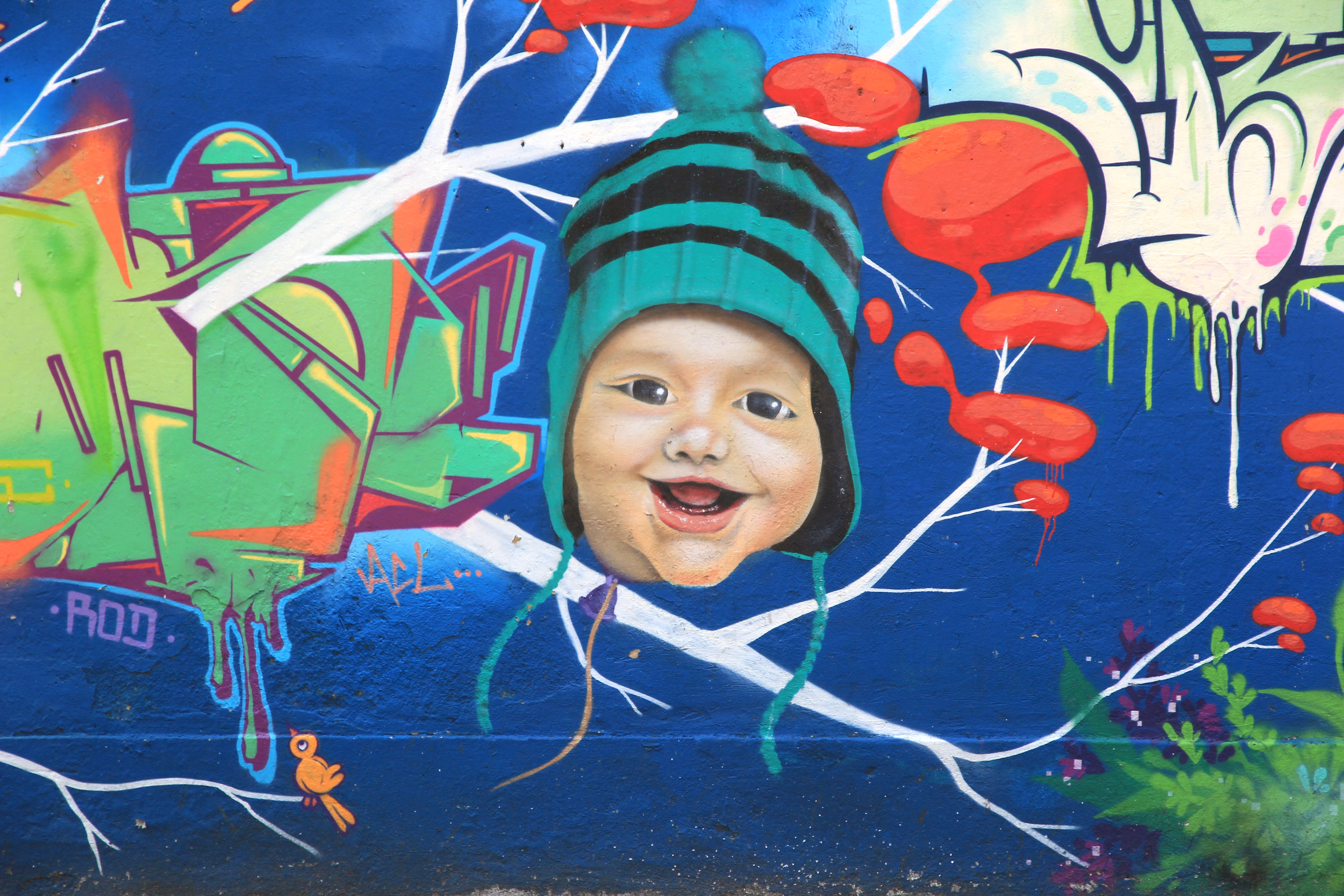 Muro Grafitado da Sociedade Hípica Brasileira na Lagoa Rodrigo de Freitas.